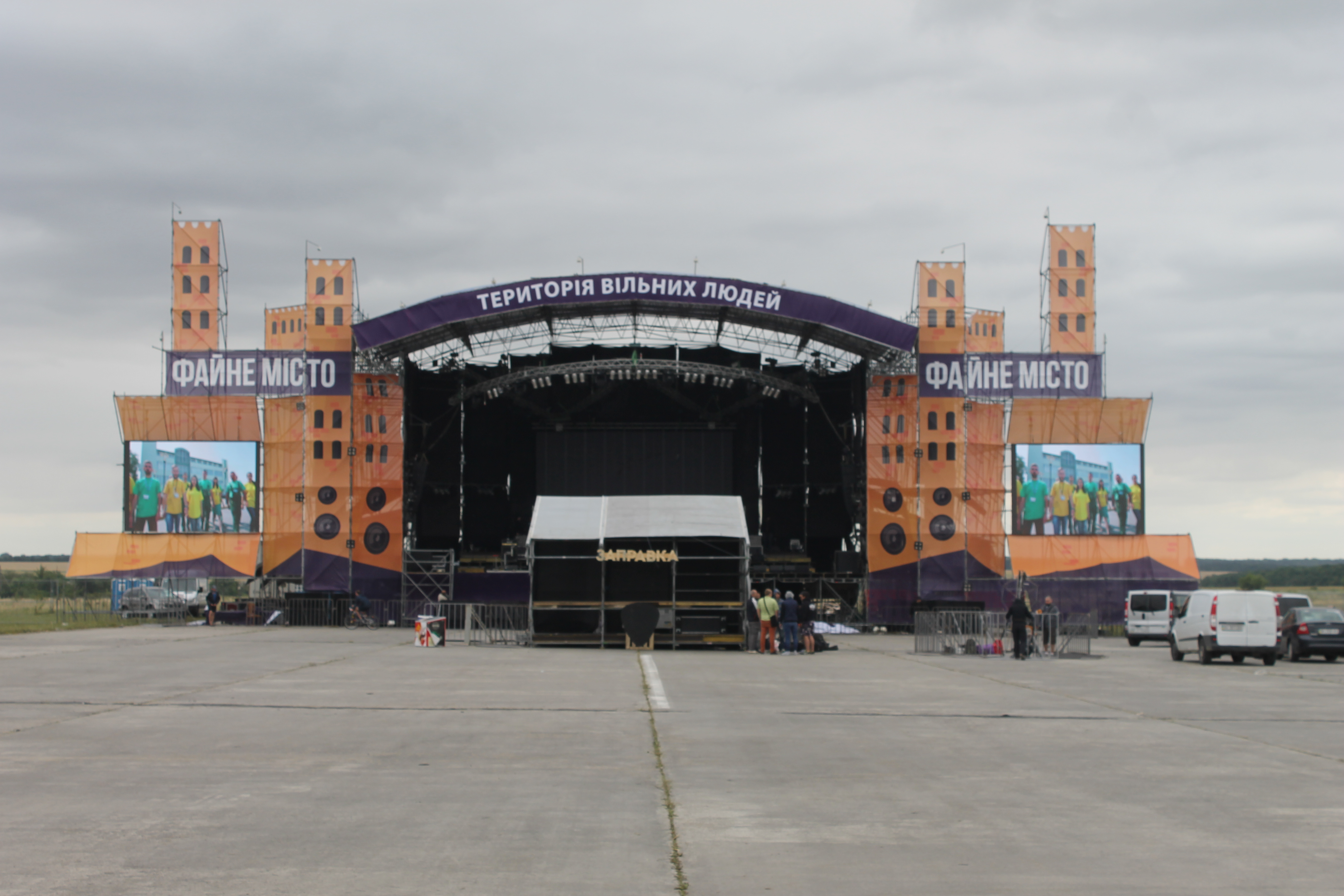 Основна сцена фестивалю